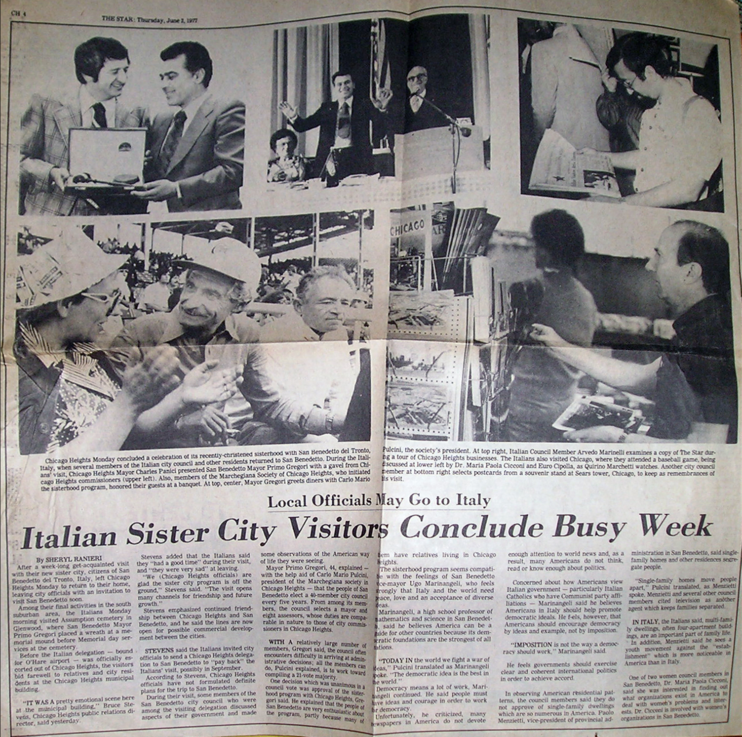 Articolo